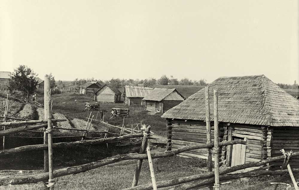 Деревня Муя.